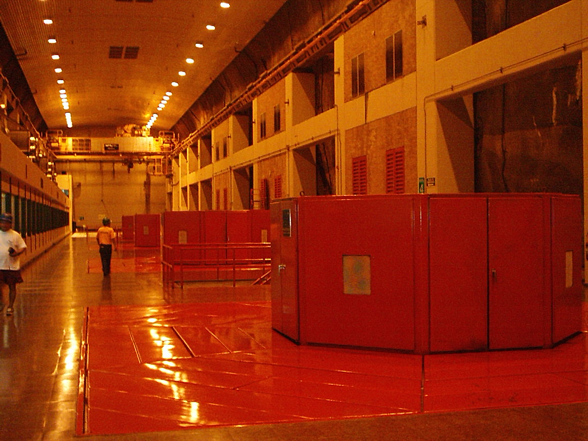 Central Hidroelectrica del Guavio